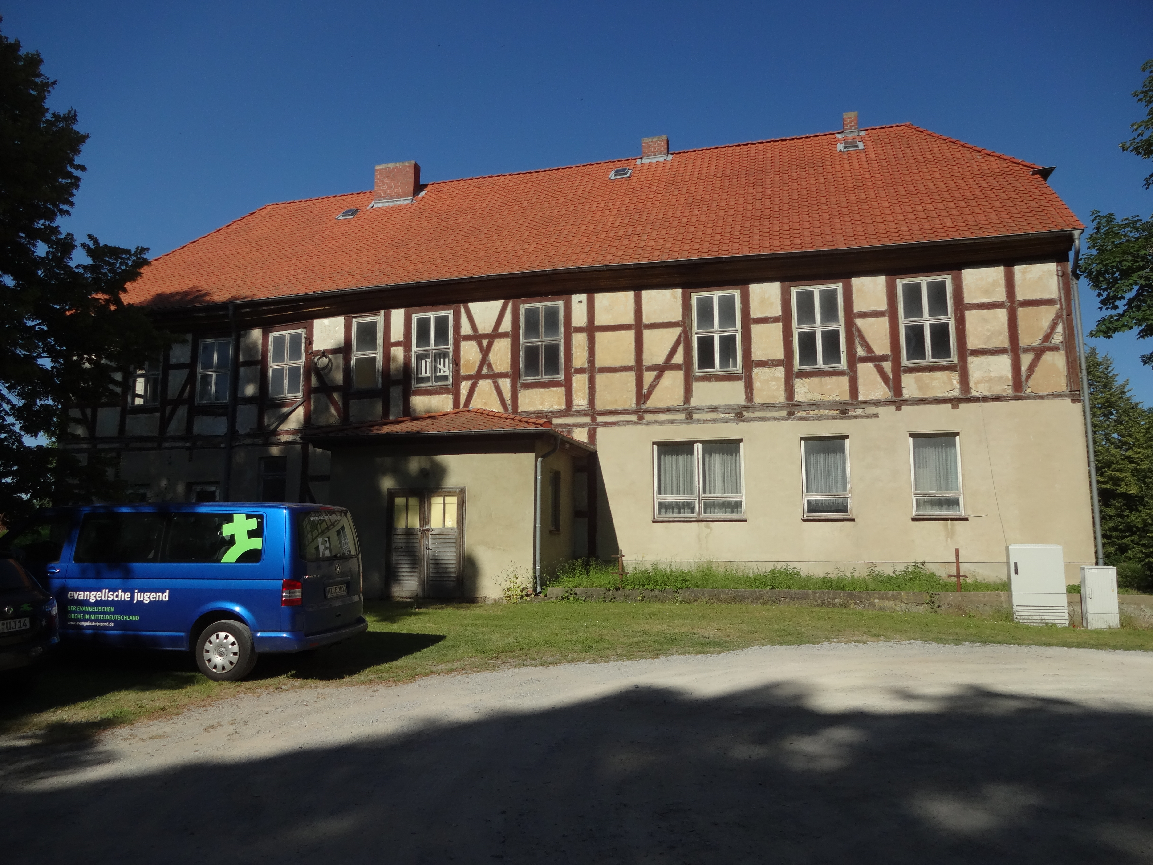 denkmalgeschütztes Gutshaus Langeln am Amtshof 13, Gemeinde Nordharz)